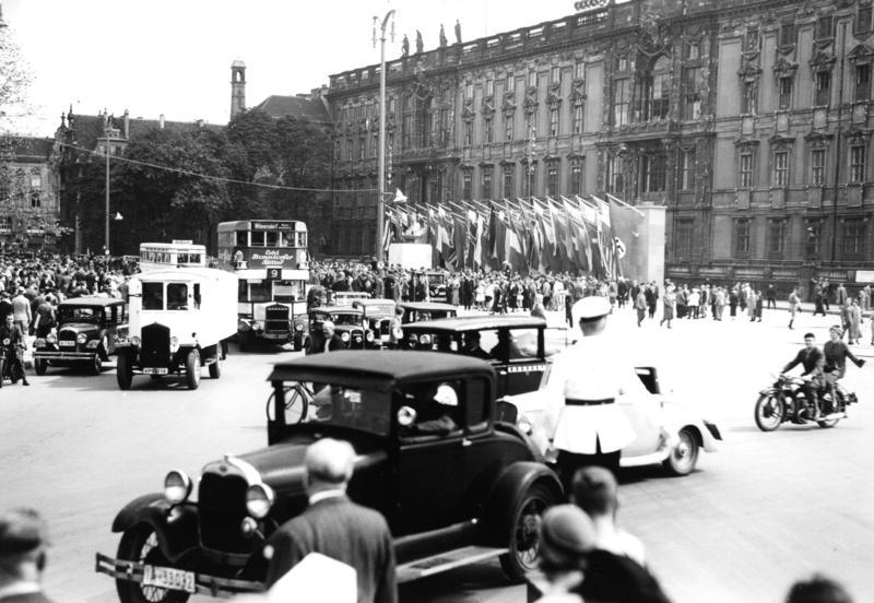 Berlin Olympiade 1936, vor dem Berliner Schloß